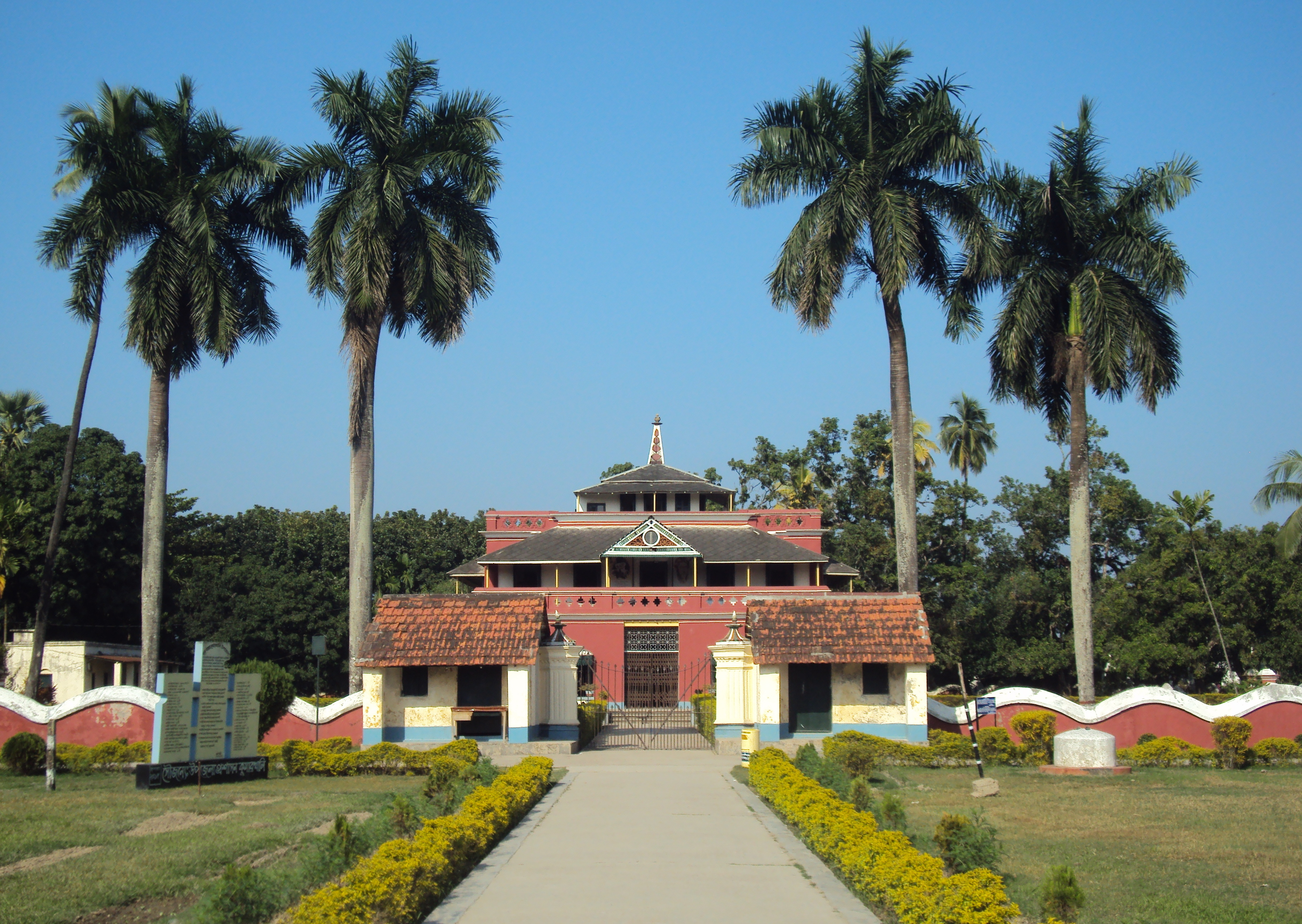 শিলাইদহ রবীন্দ্র কুঠিবাড়ি